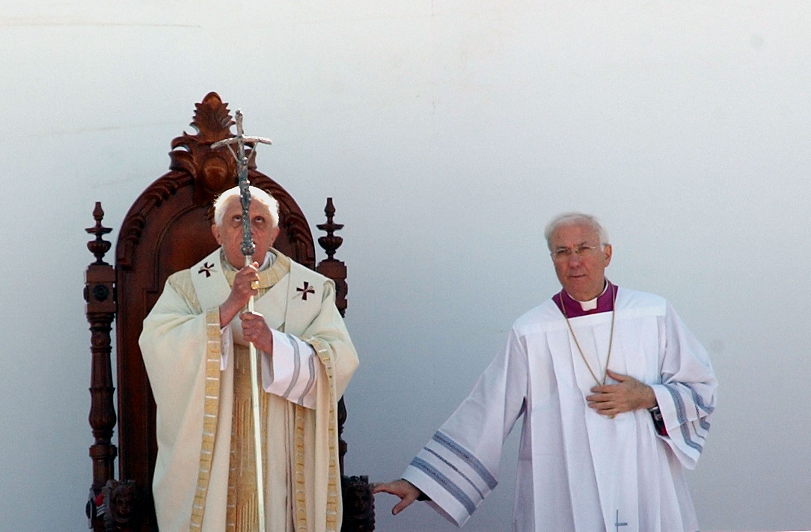 Cerimônia de canonização do frade brasileiro Frei Galvão celebrada pelo papa Bento XVI no Campo de Marte em São Paulo, Brasil.